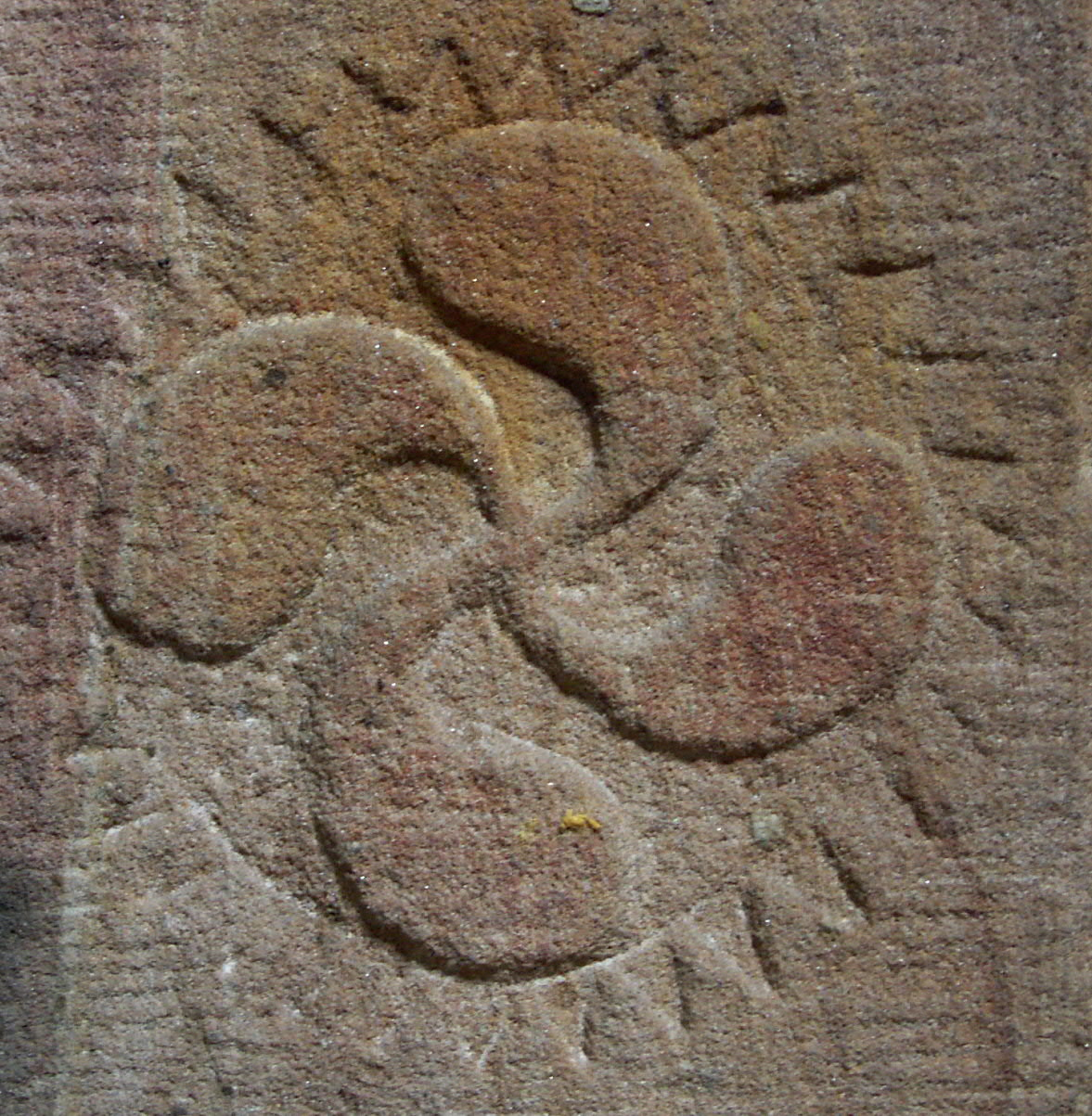 Swastika (Saubastica) auf dem Fuß des Taufsteins in der kath. Kirche Labach - Kreis Südwestpfalz - Rheinland-Pfalz - Germany